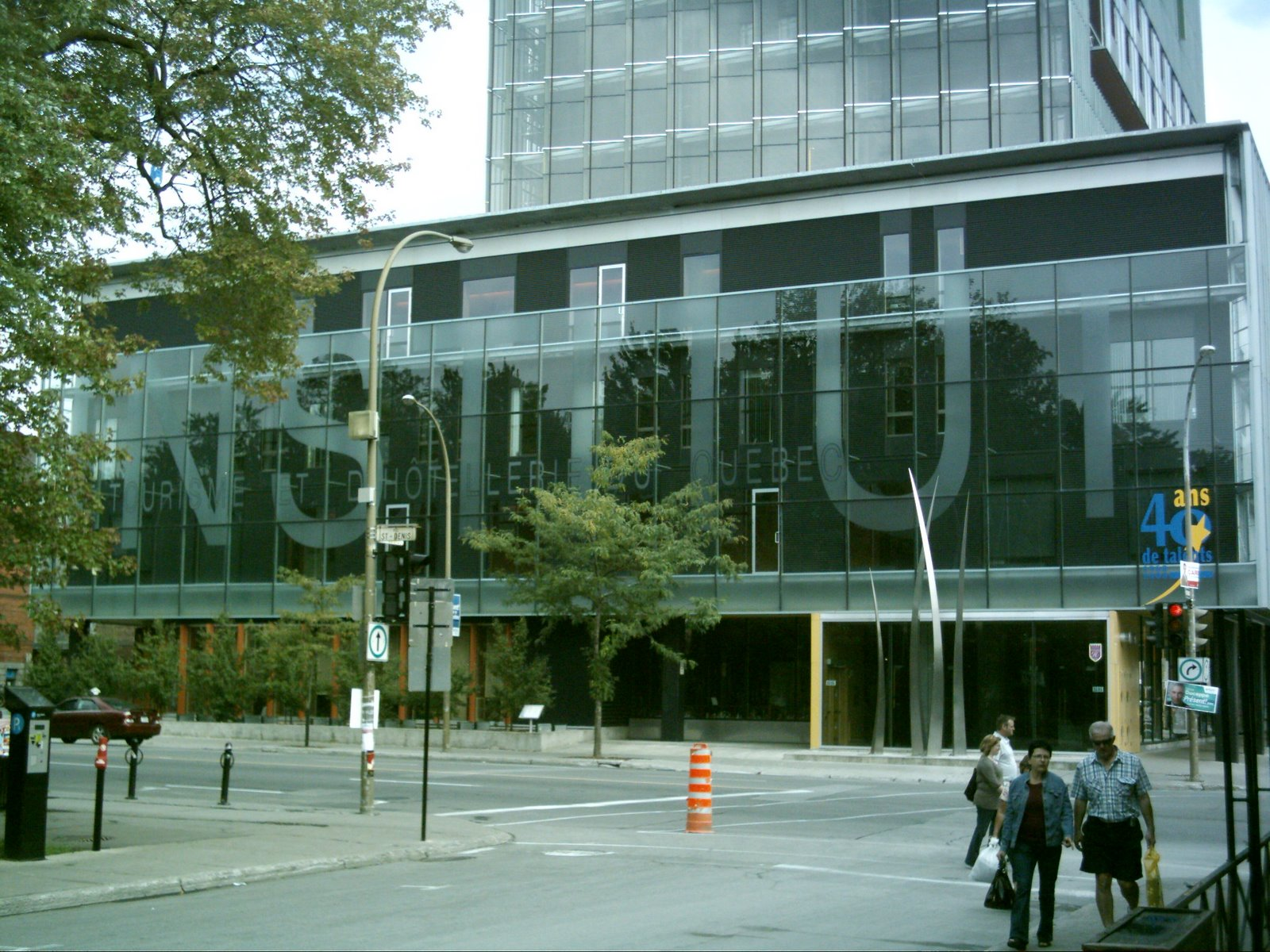 Édifice de l'Institut de tourisme et d'hôtellerie du Québec, situé rue Saint-Denis à Montréal